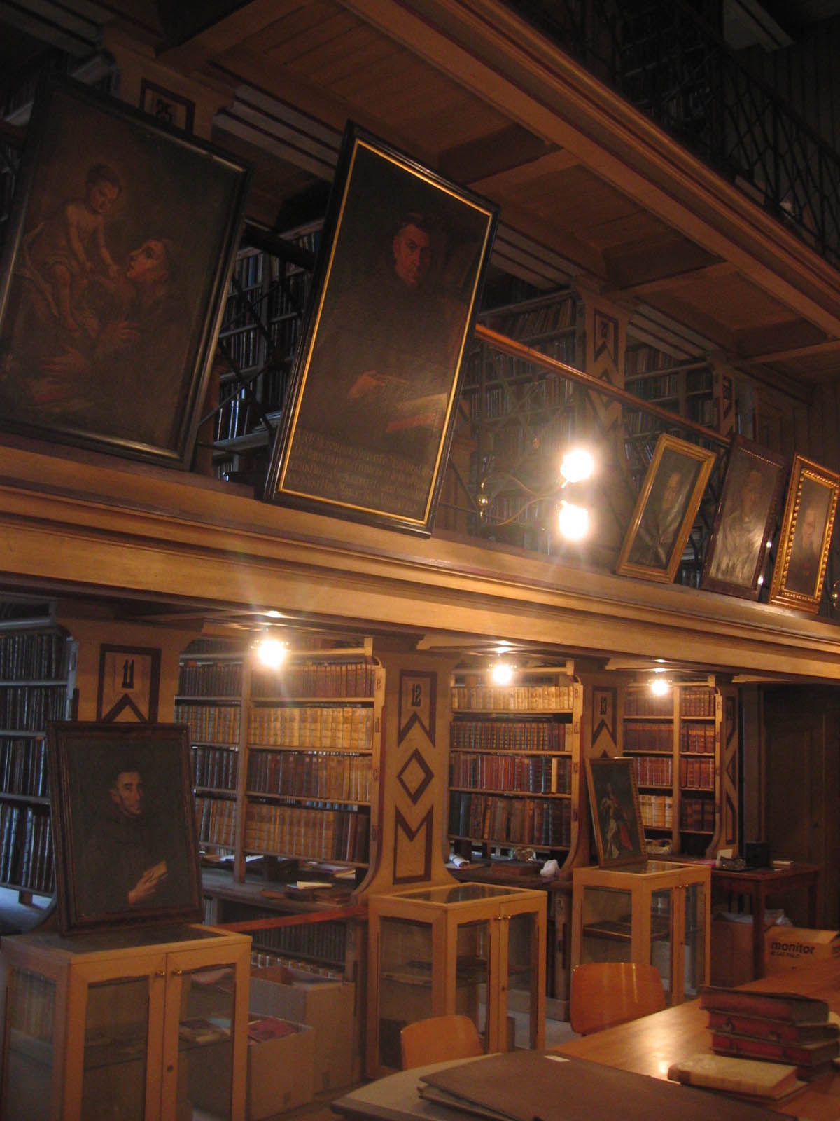 Franciscan library in Ljubljana